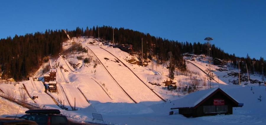 Alle Vikersund Hoppsenters bakker: fra venstre mod højre K15, K25, K45, K65, K185 (skiflyvningsbakken), K105. Vikersund befinder sig i Modum kommune, Buskerud fylke, Norge